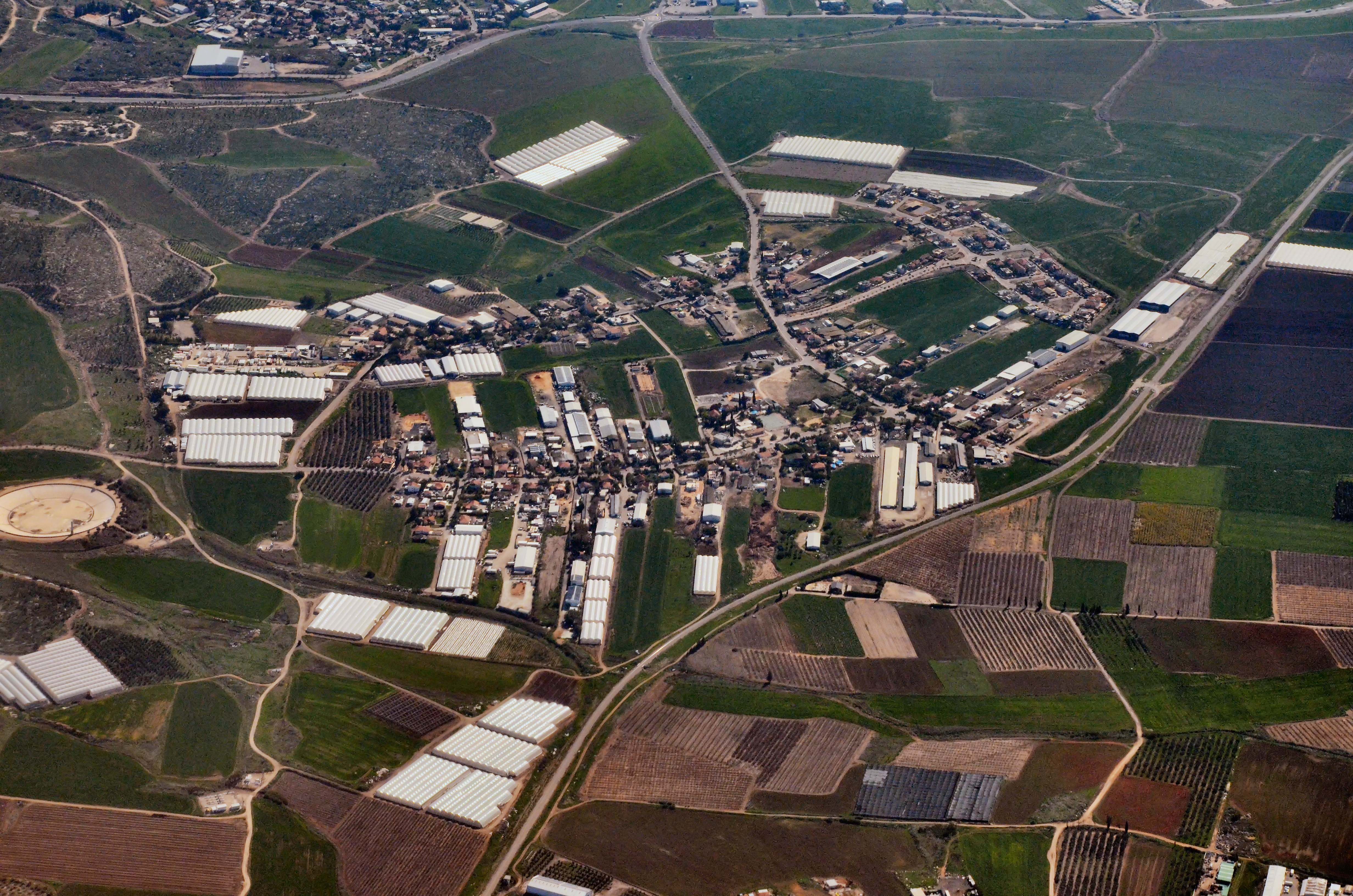 מושב גבעת כ"ח